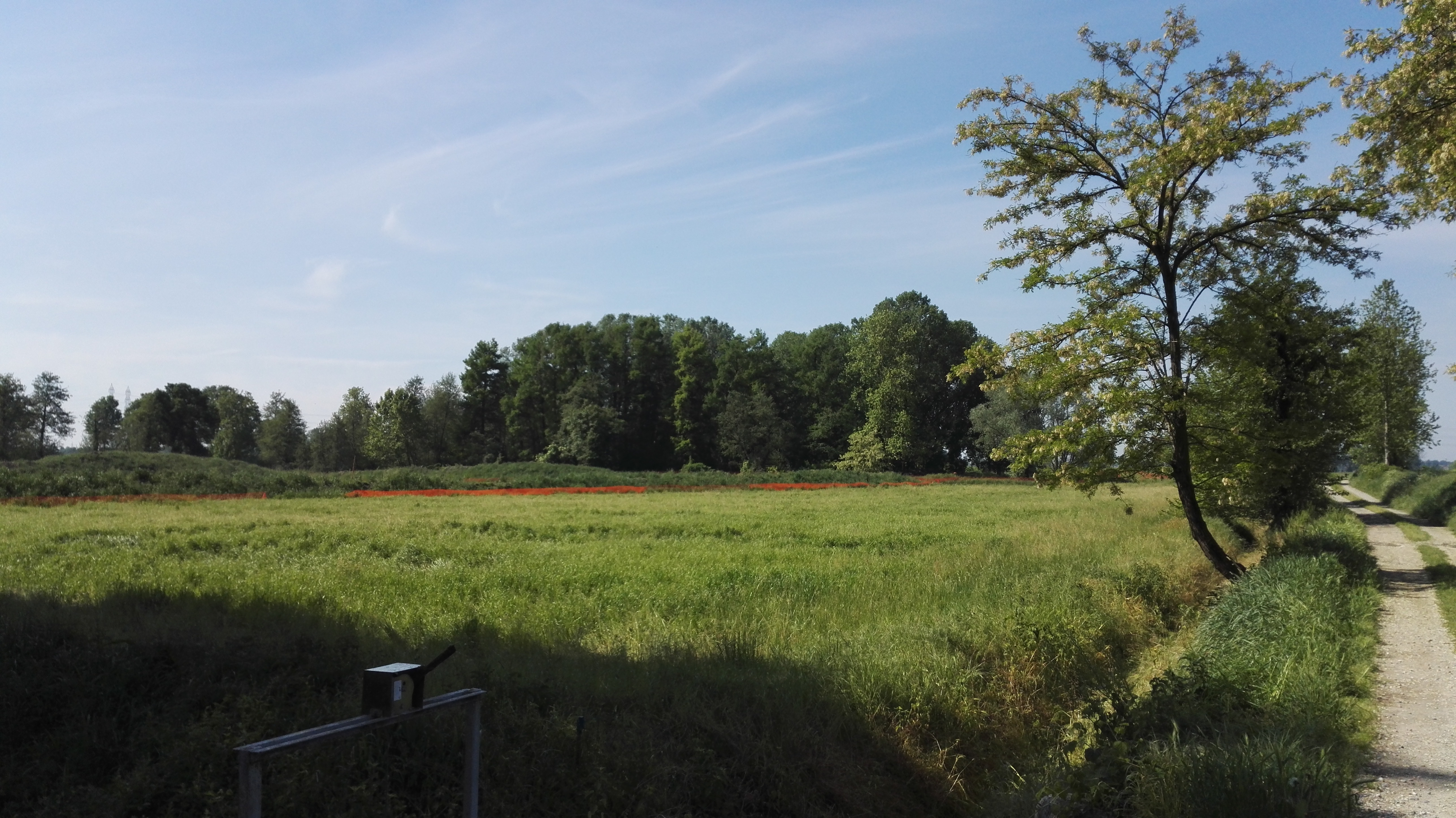 Bosco planiziale in località Isola Balba nel comune di Mulazzano(LO)